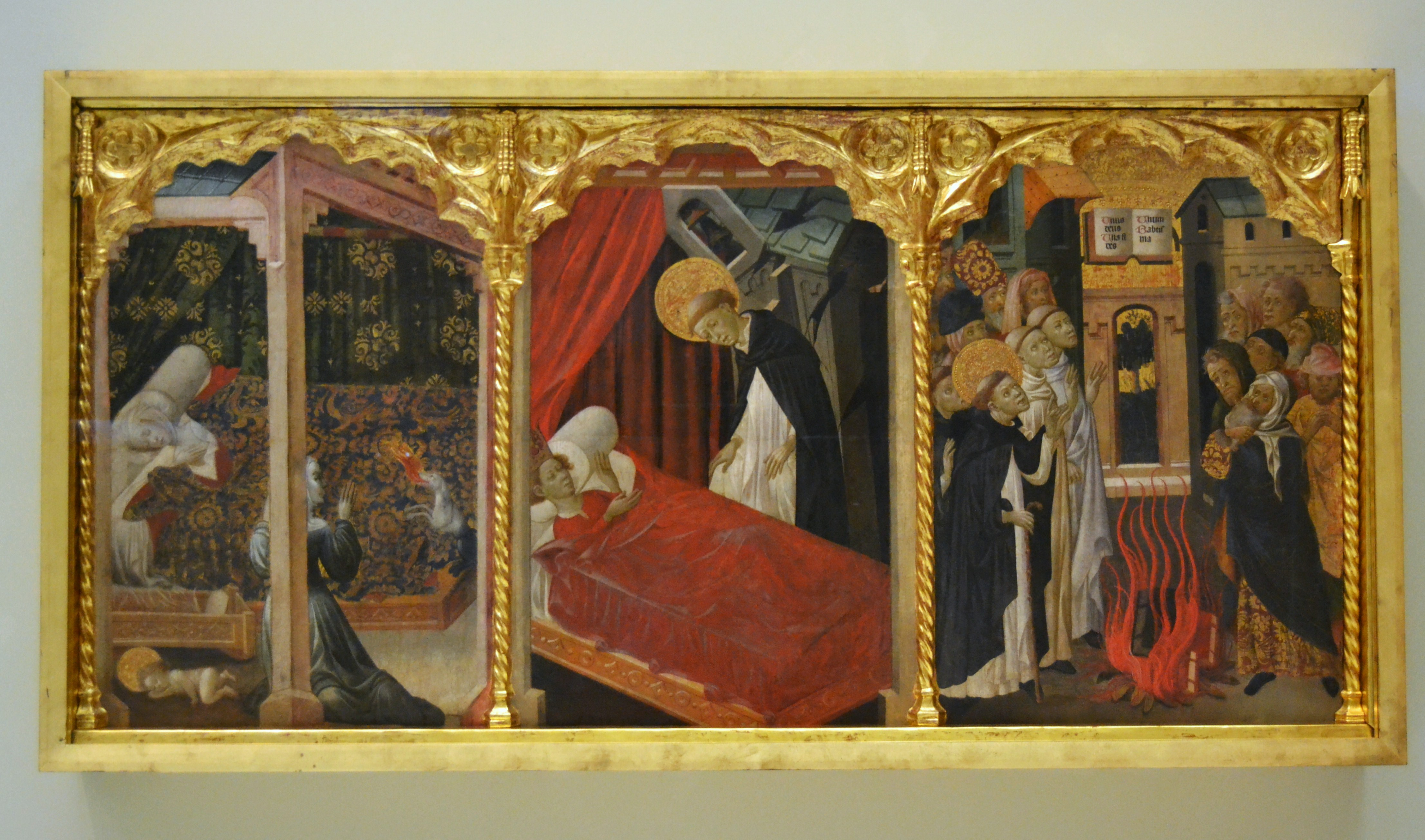 La obra representa tres escenas de la vida de Santo Domingo de Guzmán, el fundador de la Orden de los dominicos.